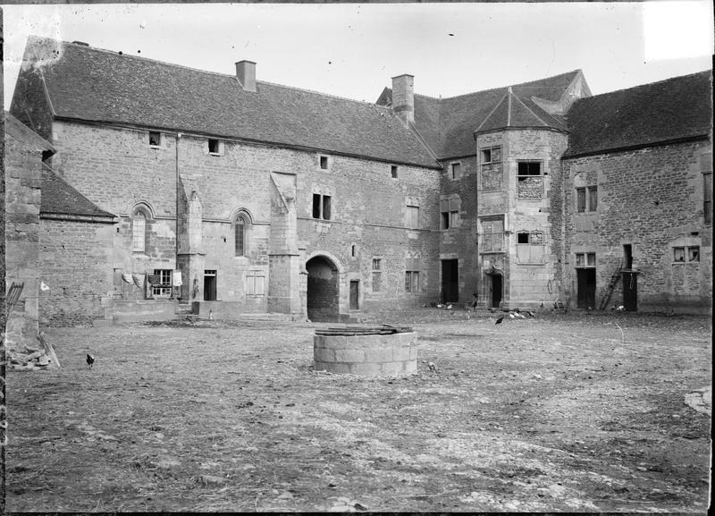 Prise de vue du château de Pisy, cour intérieure, en 1907 par Jules Tillet. A cette période le château est une ferme